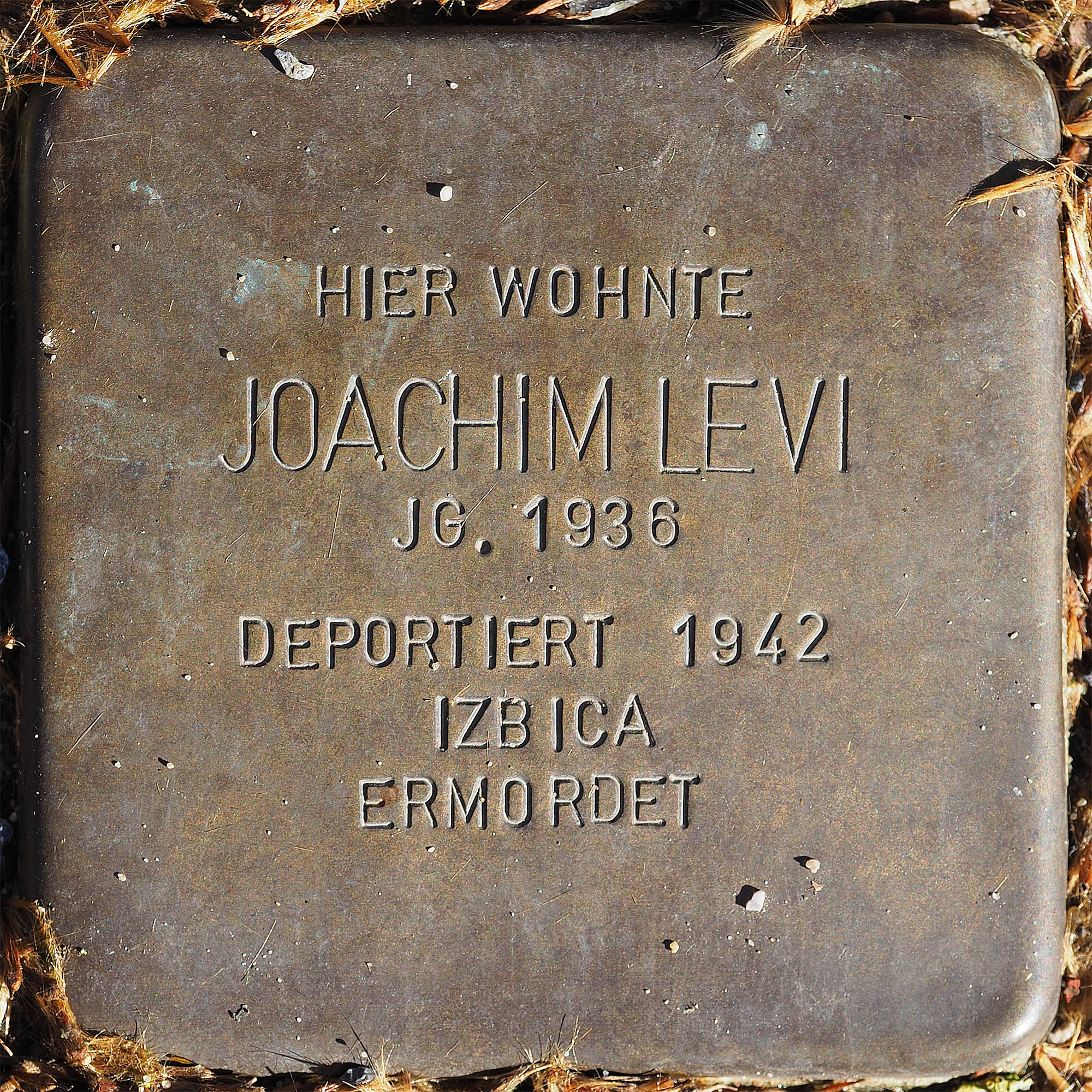 Stolpersteine MG: Levi, Joachim